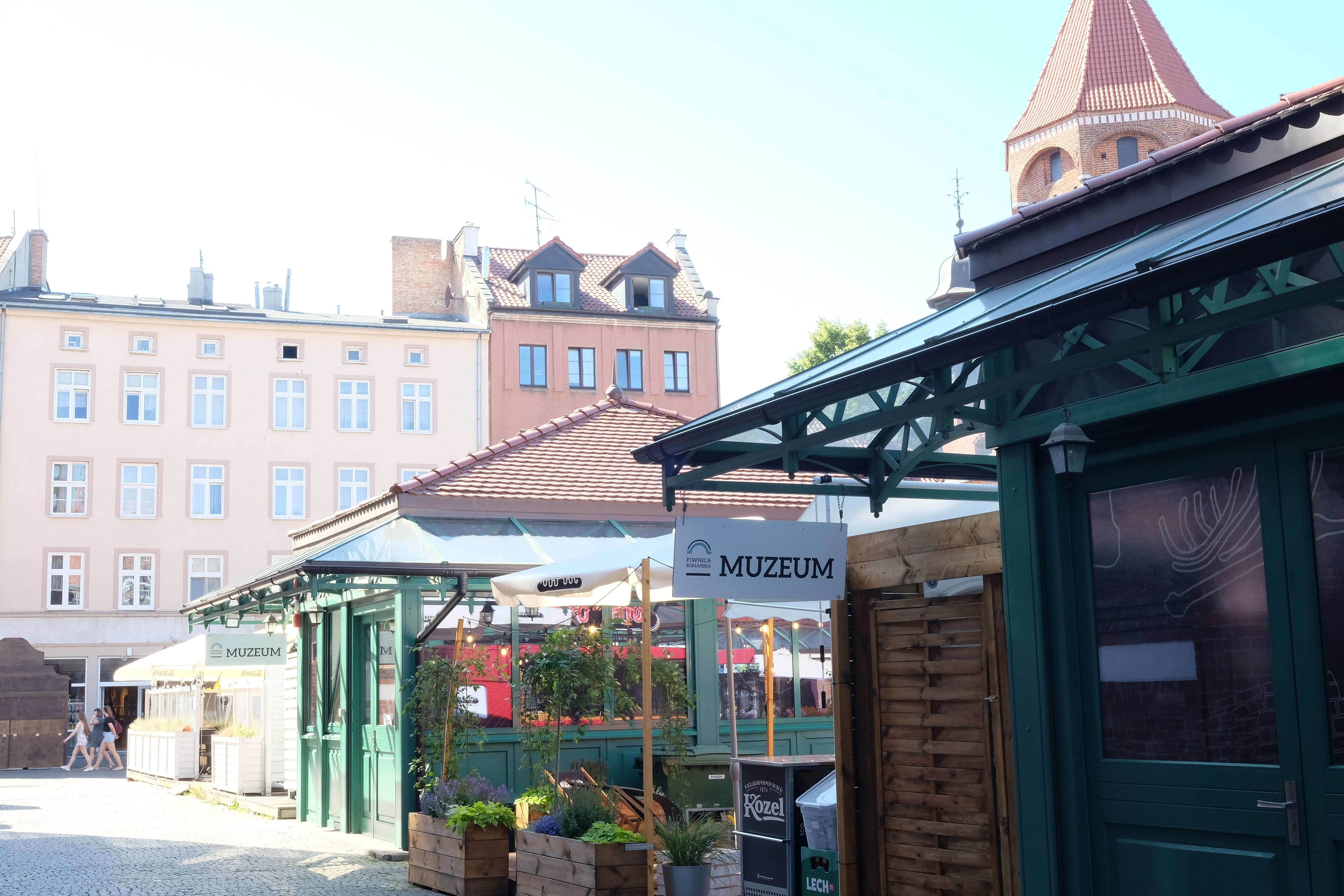 Pawilony obsługujące Piwnicę Romańską - Oddział Muzeum Archeologicznego. Zdjęcie wykonano w okresie Jarmarku Dominikańskiego.